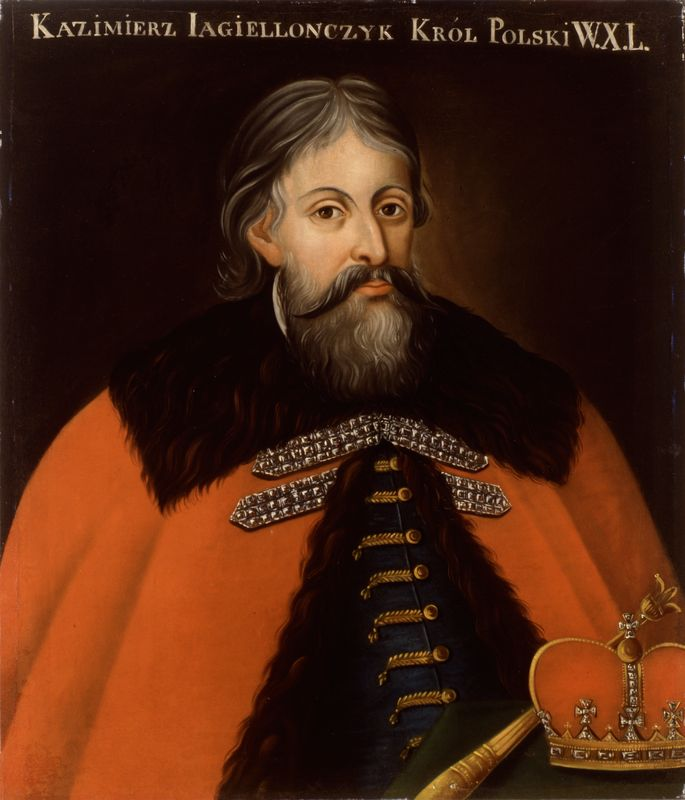 Беларуская (тарашкевіца): Партрэт вялікага князя Казімера Ягайлавіча (Kazimier Jagajłavič)